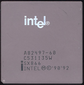 Intel A82497-60